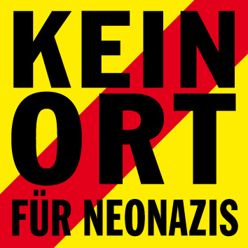 Logo der Kampange "Kein Ort für Neonazis", der Amadeu Antonio Stiftung